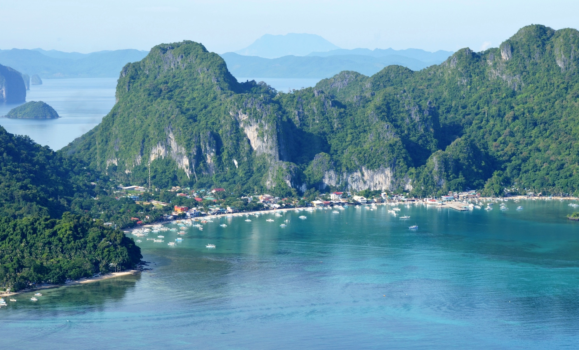 El Nido, Palawan, Philippines